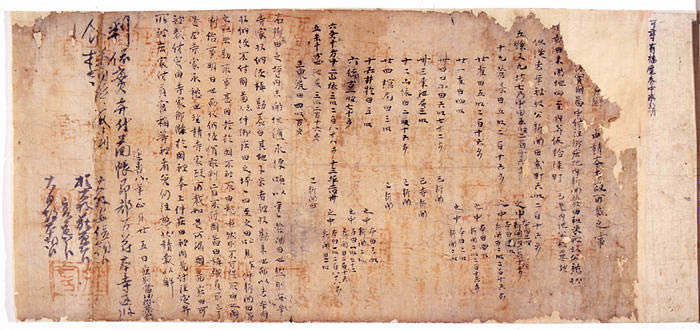 東大寺文書 延喜8年（908）の年号のある当館最古の文書 明治21年（1888）明治政府が購入